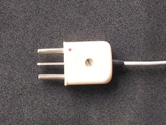 Tonabnehmerstecker, eine ältere Norm, Version der Firma Hirschmann